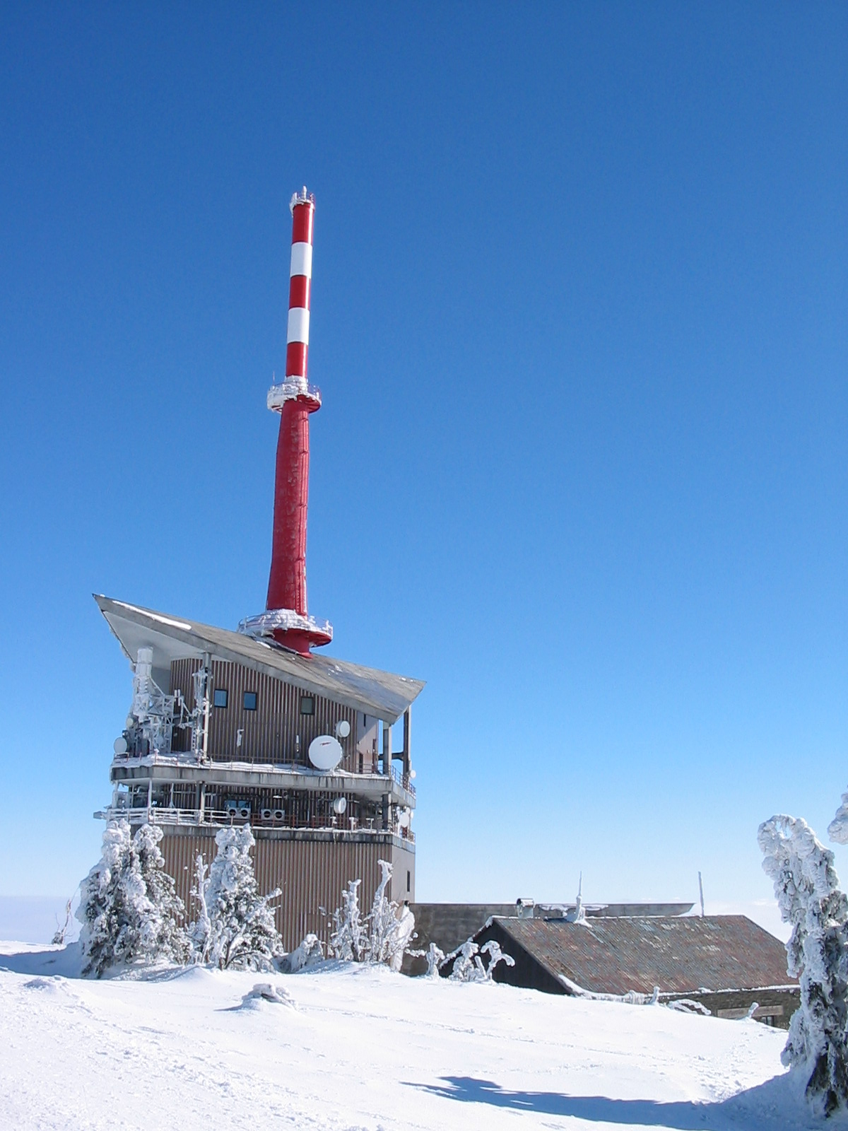 TV vysílací věž na Lysé hoře v Beskydech